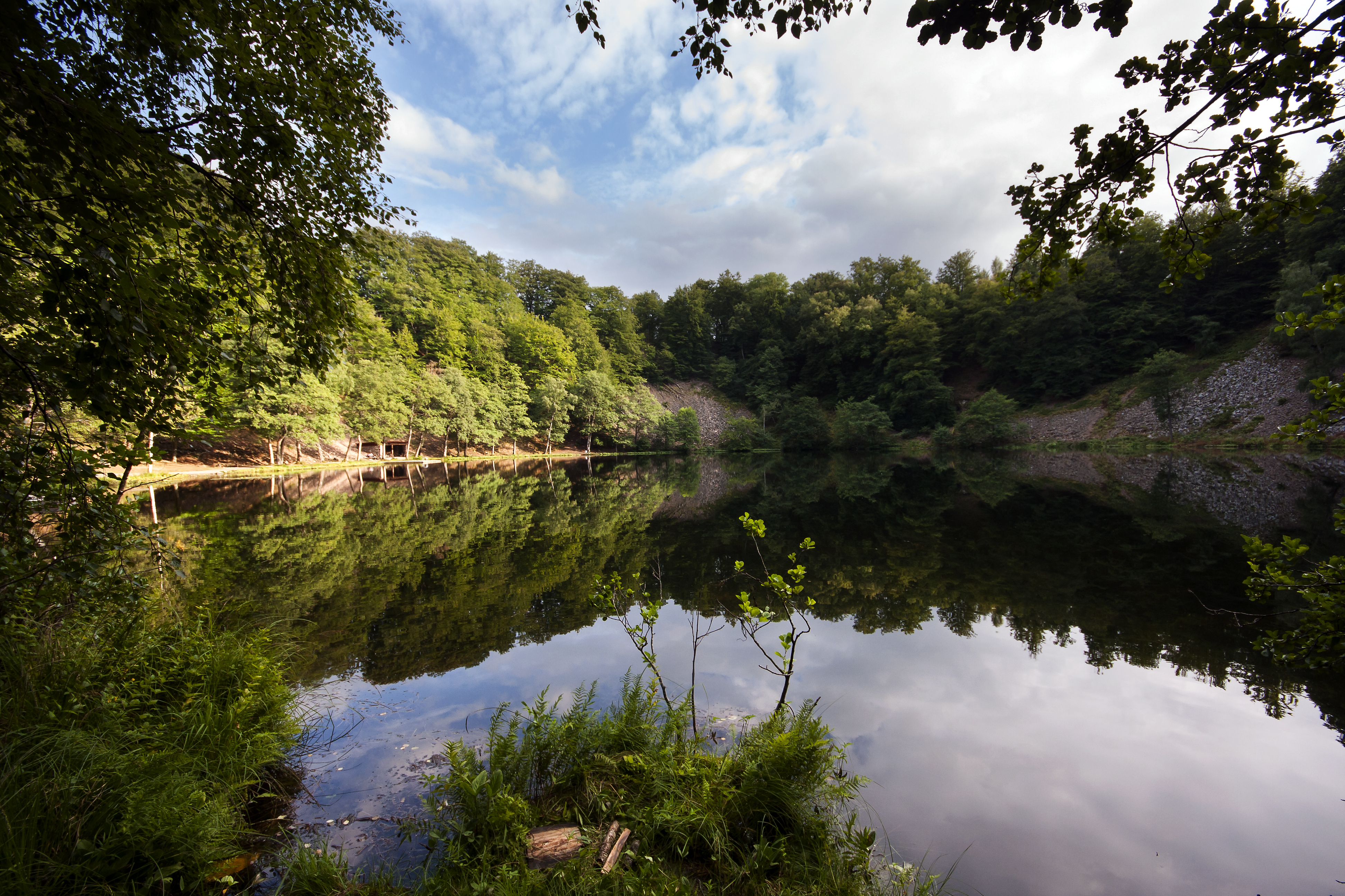 Odensjön i augusti 2013.